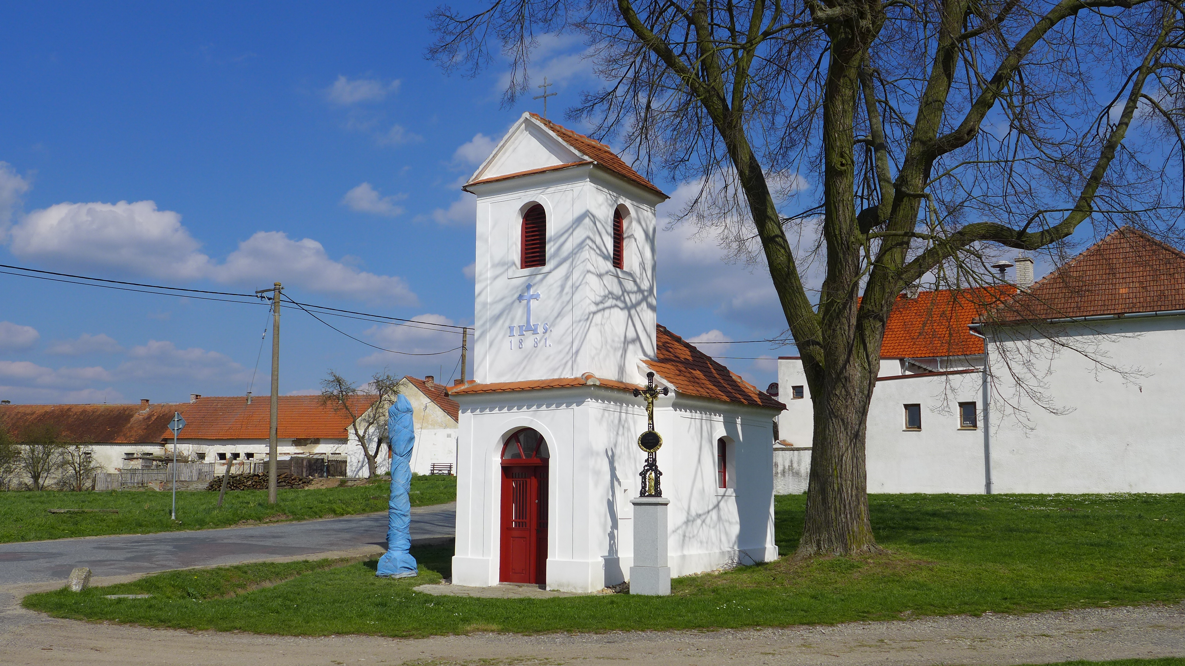 Kaple se zvonicí, Rozkoš (okres Znojmo).